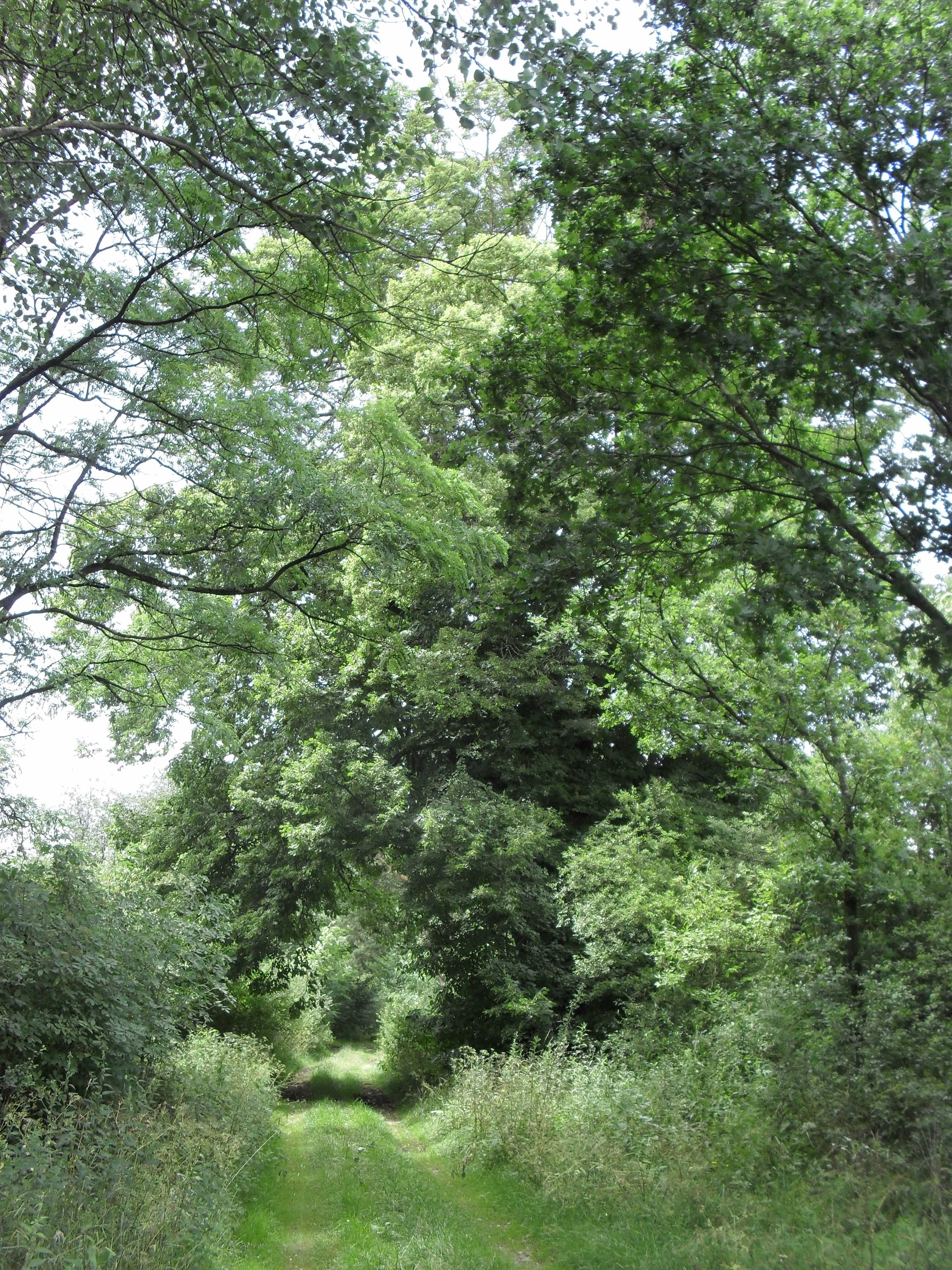 Celý pohled na tuto lípu. Bohužel zastíněn listy jiných stromů. Moje vlastnoruční fotka.